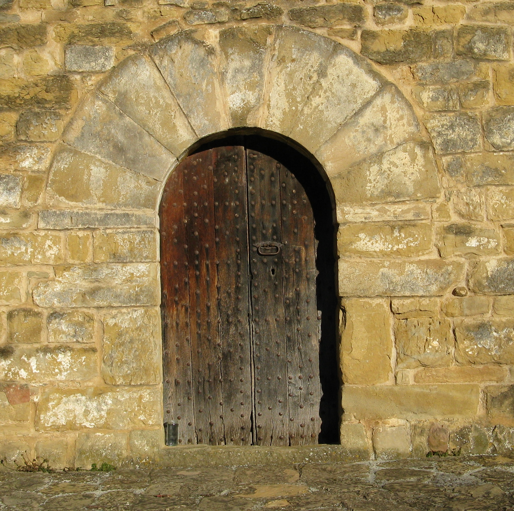 Romanische Kirche „Sant Joan dels Balbs“ (Einsiedelei) im „Val de Bas“, nahe der Ortschaft „La Pinya“, Katalonien, Spanien) - Eingang